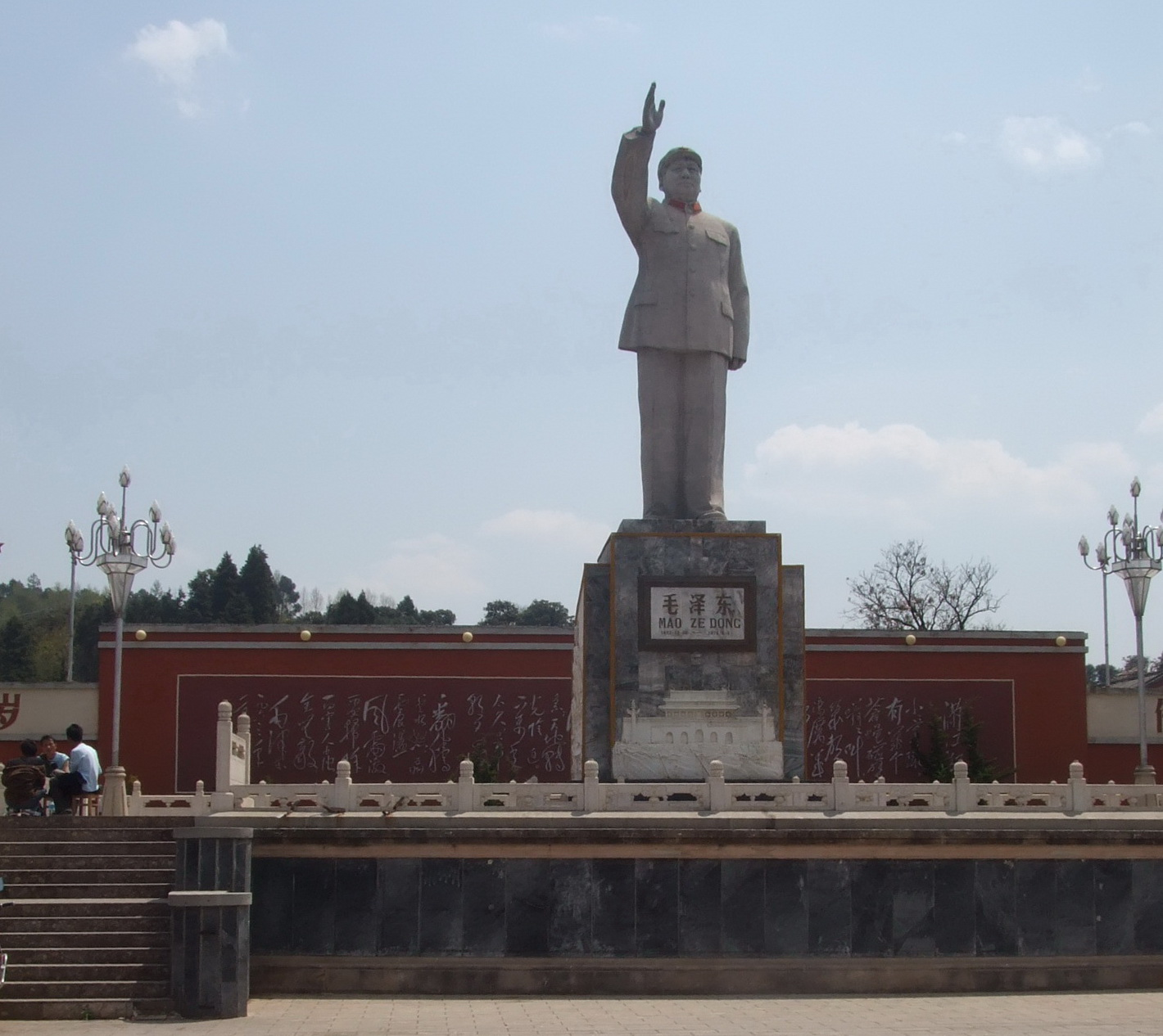 云南-丽江.文革時的塑像